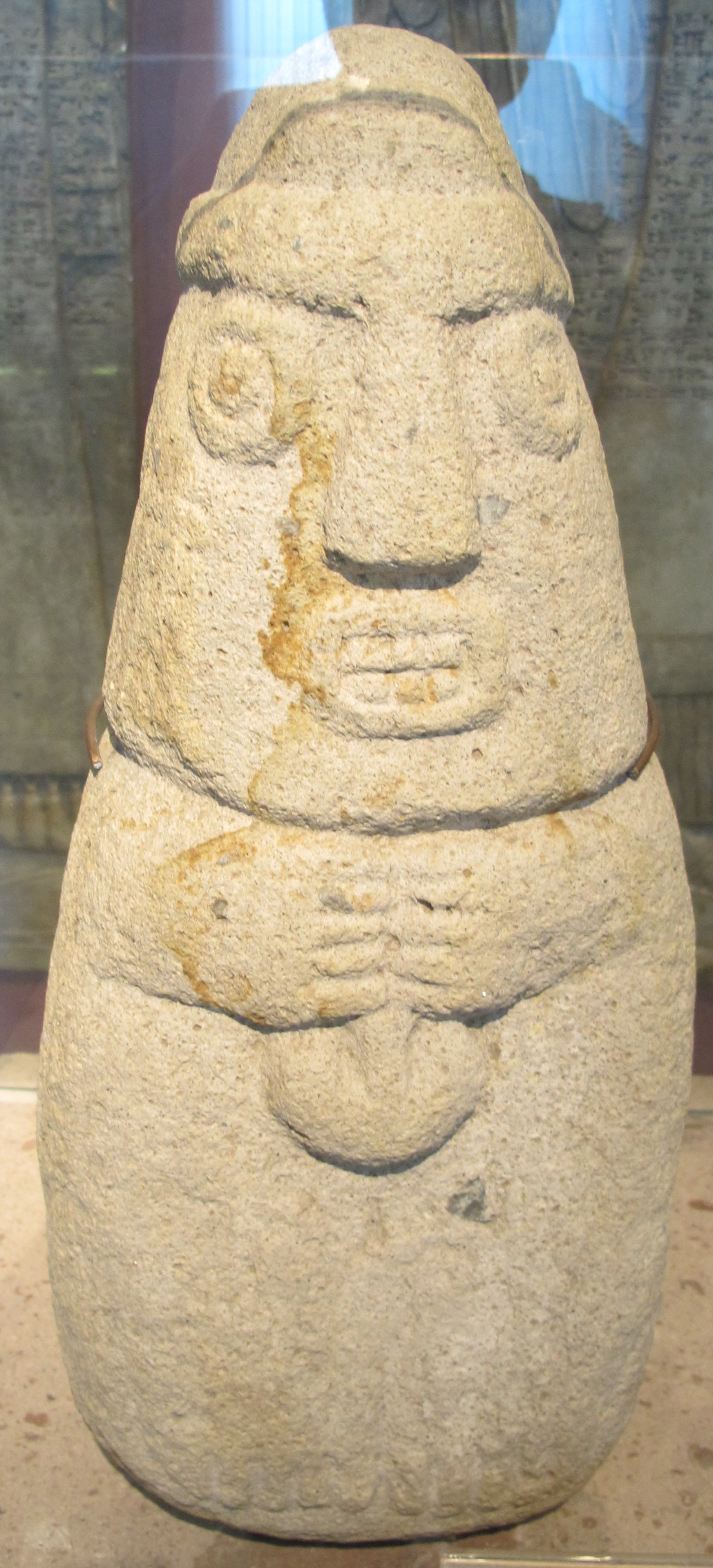 Statuetta di un sacerdote-guerriero, perù, cultura recuay, 500 ac. ca